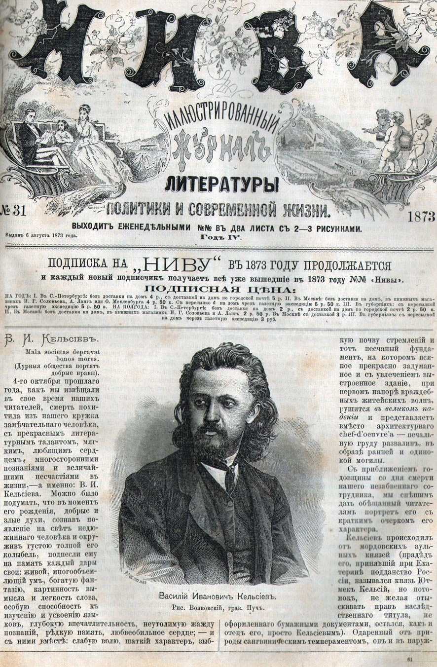 'Niva' magazin